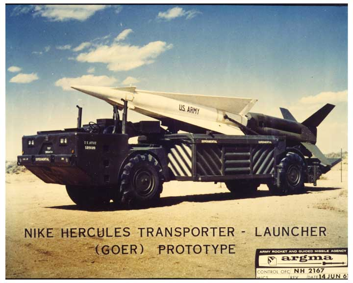 MIM-14 Nike-Hercules